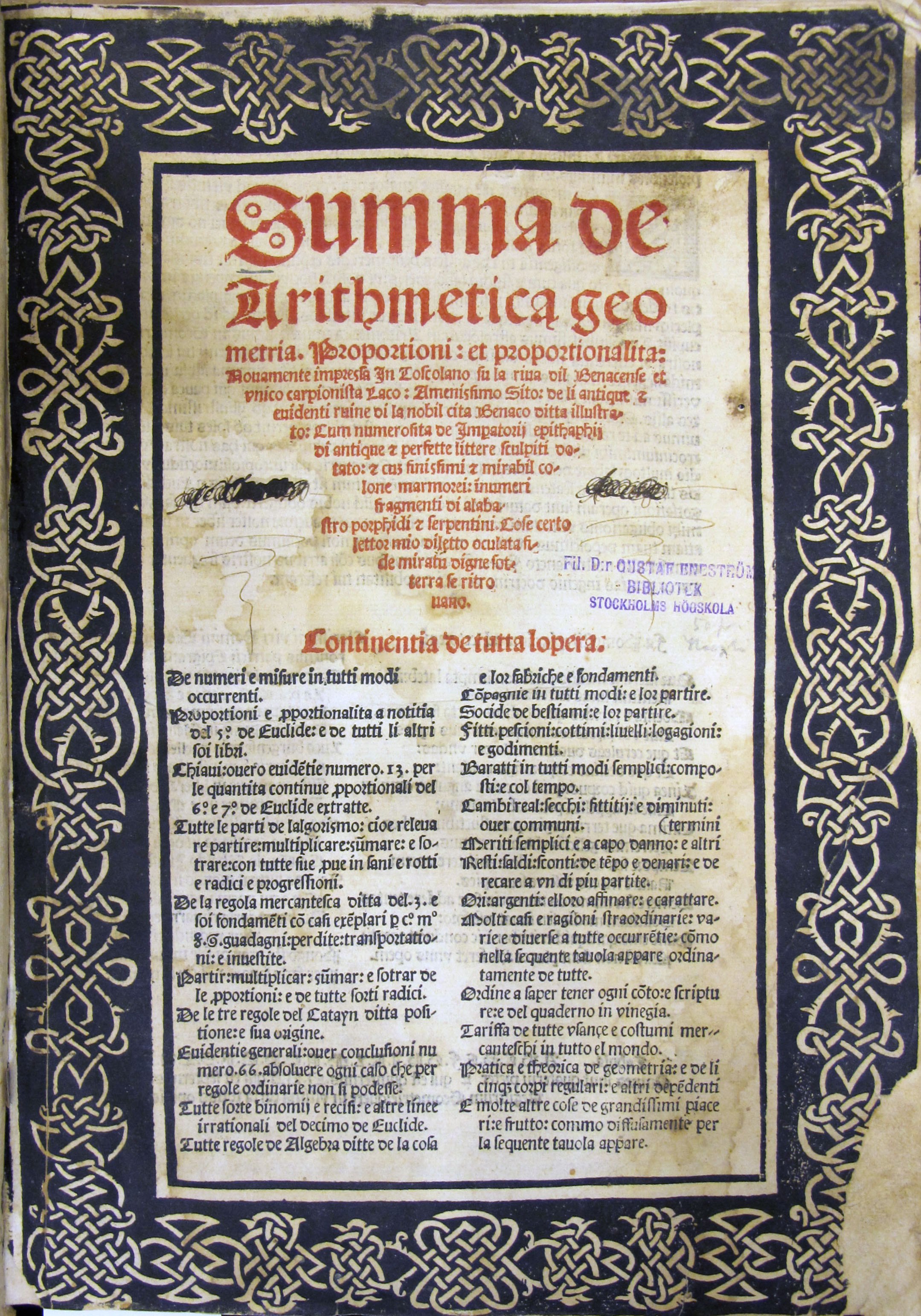 Titelbladet i Summa de arithmetica, geometria, proportioni, et proportionalita., 1523 Avbildat exemplar tillhör Gustaf Hj. Eneströms bibliotek, Stockholms universitetsbibliotek. Title page of Summa de arithmetica, geometria, proportioni, et proportionalita by Luca Pacioli, 1523 edition